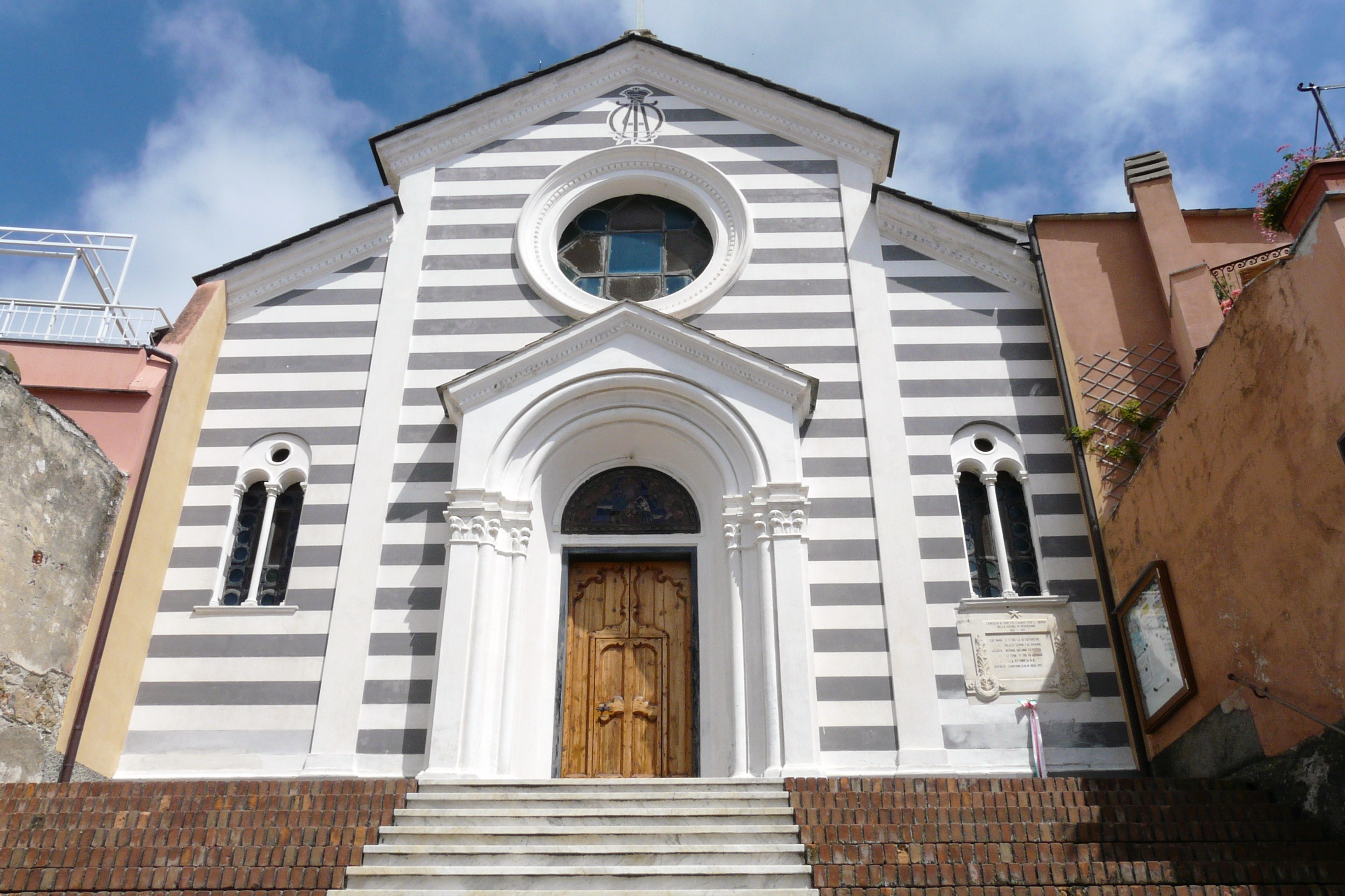 Chiesa di Santa Maria Assunta a Lemeglio, Moneglia, Liguria, Italia